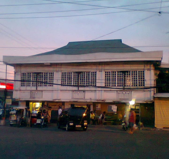 Casa Antonio Baustista